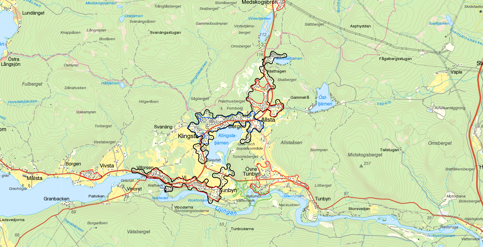 Tätorterna Klingsta och Allsta samt Tunbyn med gränserna från Statistiska centralbyråns tätortsavgränsning 2010 i blått och 2015 i svart. Småortsgränser från 2010 i rött. Bakgrundskarta från Lantmäteriet, skala 1:30 236.